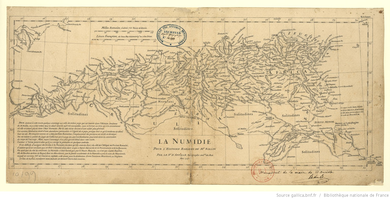 Très ancienne carte de 1742